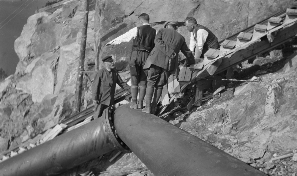 Flørli kraftverk. Fra anlegget. Rørbrudd 1920